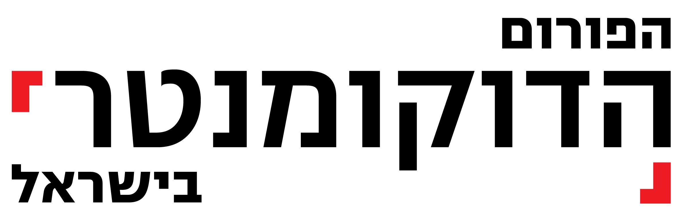 לוגו הפורום הדוקומנטרי בישראל